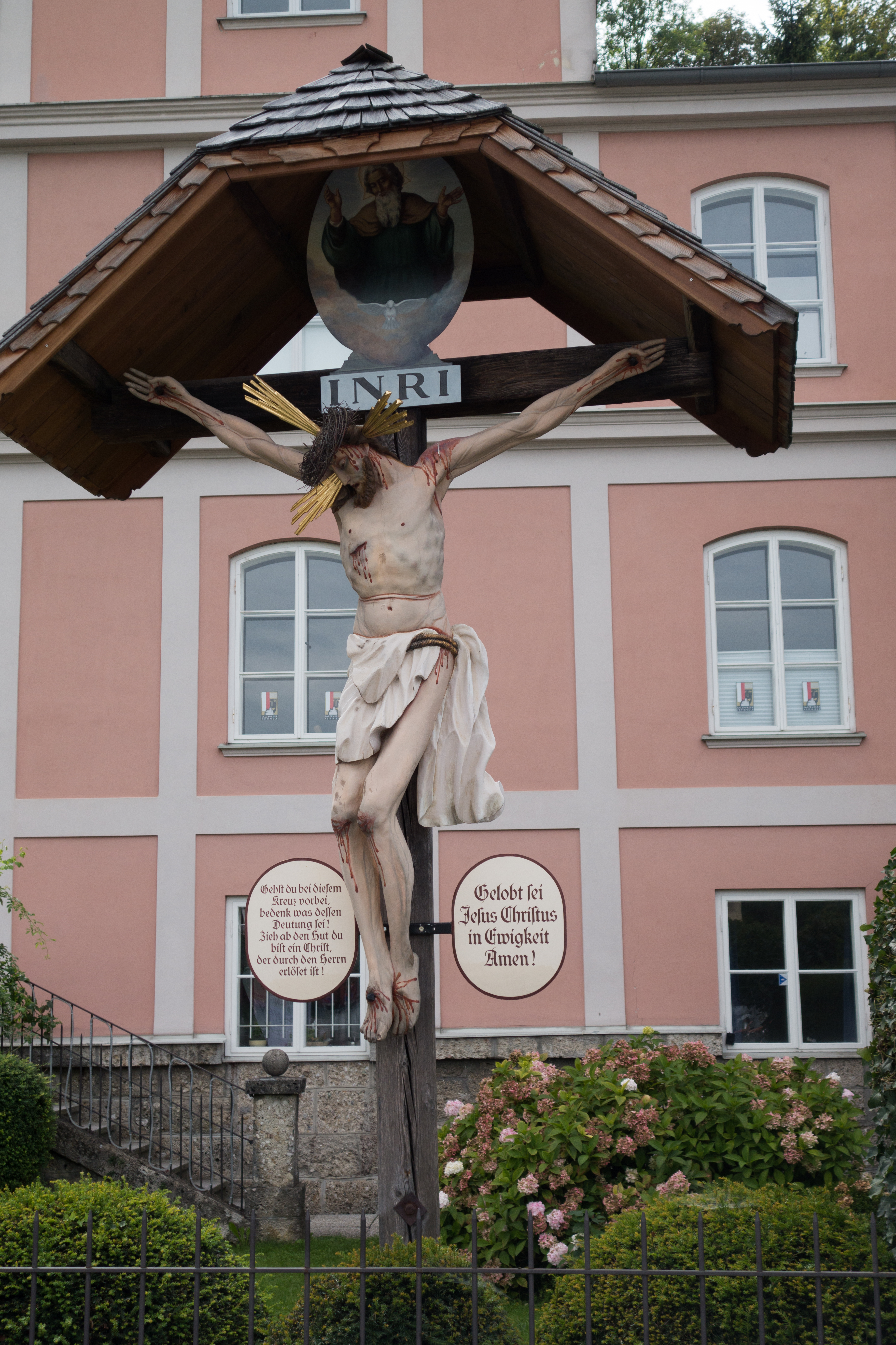 Salzburg, Schifferkreuz am Franz-Josef-Kai